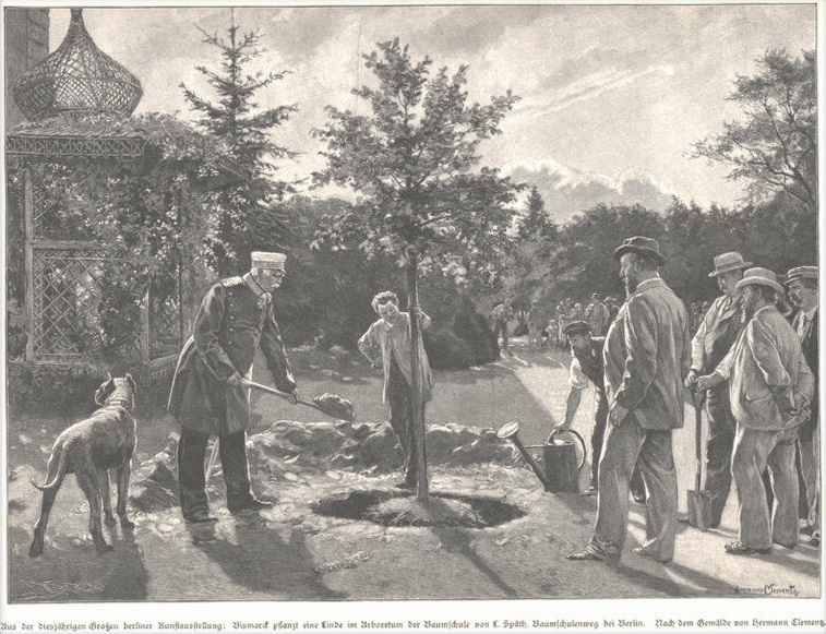 Bismark pflanzt eine Linde in der Baumschule Späth